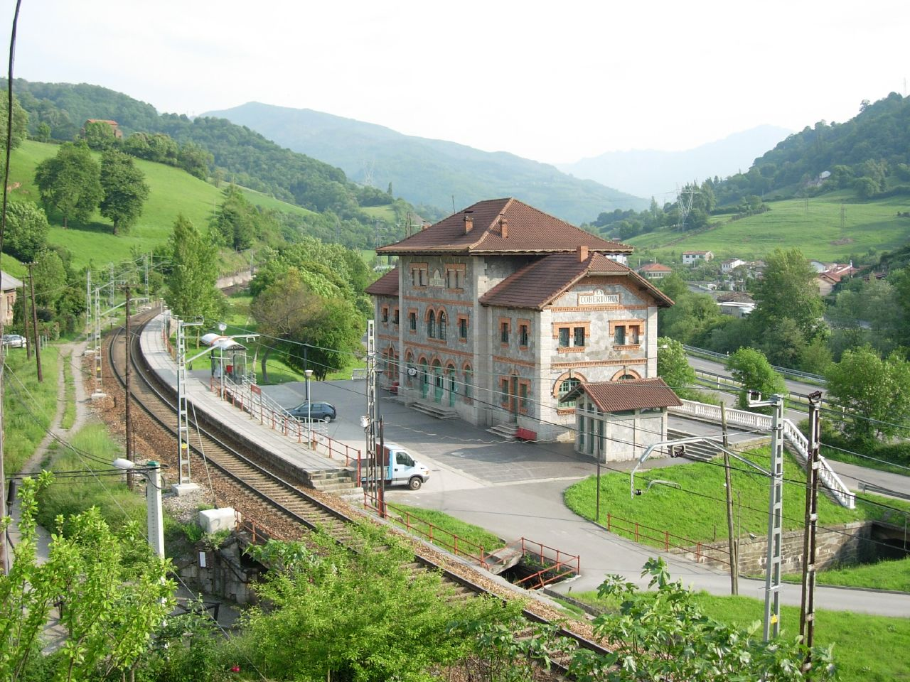 Estación de ferrocarril de la Cobertoria